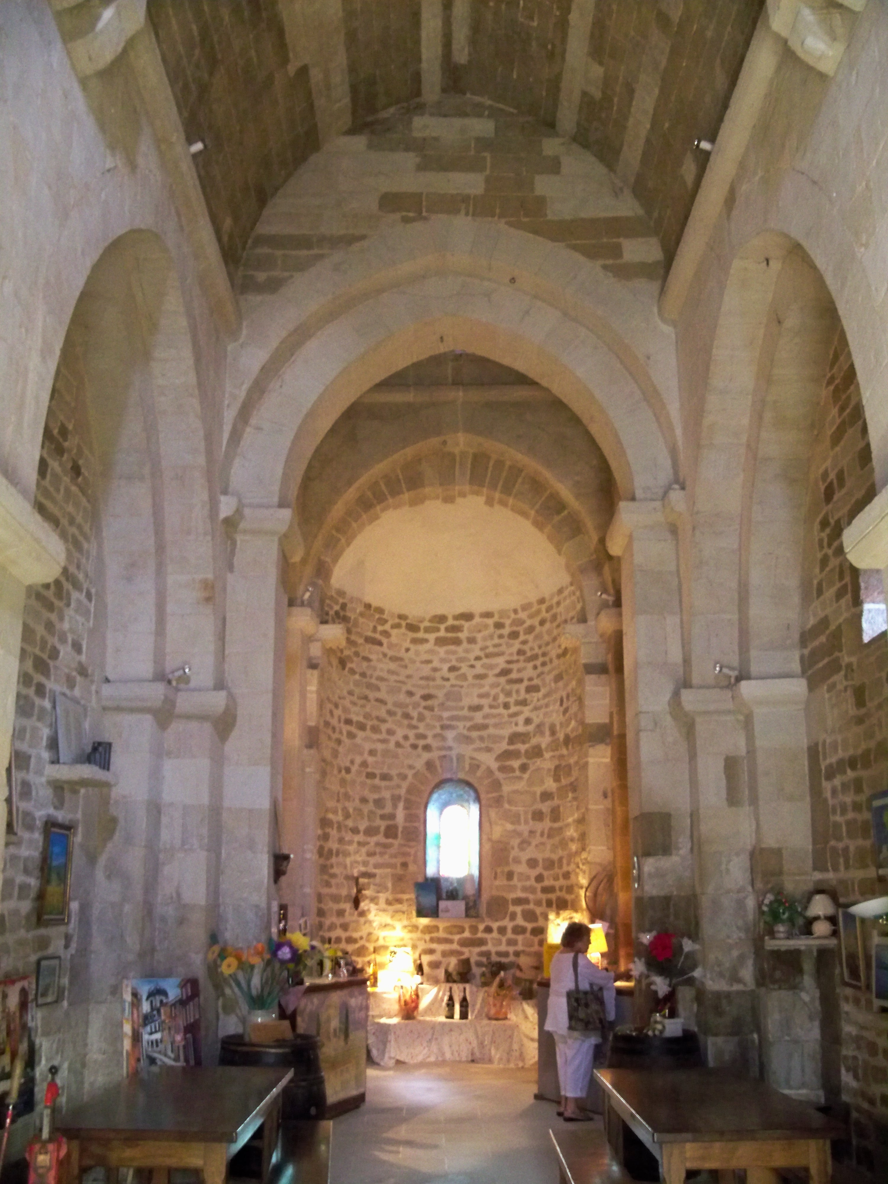 Chapelle Saint-Sixte d'Aubignan, Route de Caromb (Inscrit, 1984) .